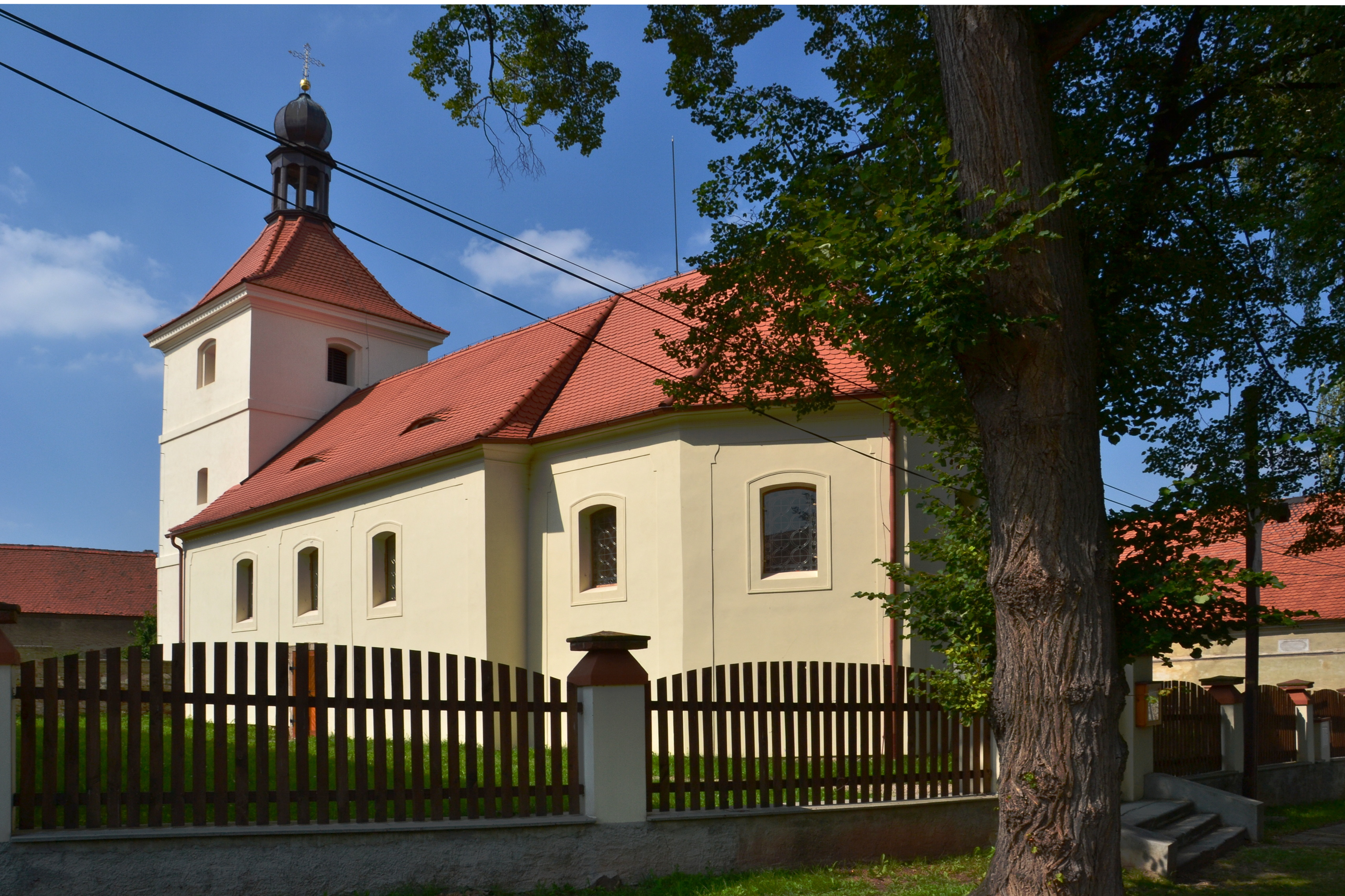 Kostel sv. Mikuláše (Želeč), Želeč